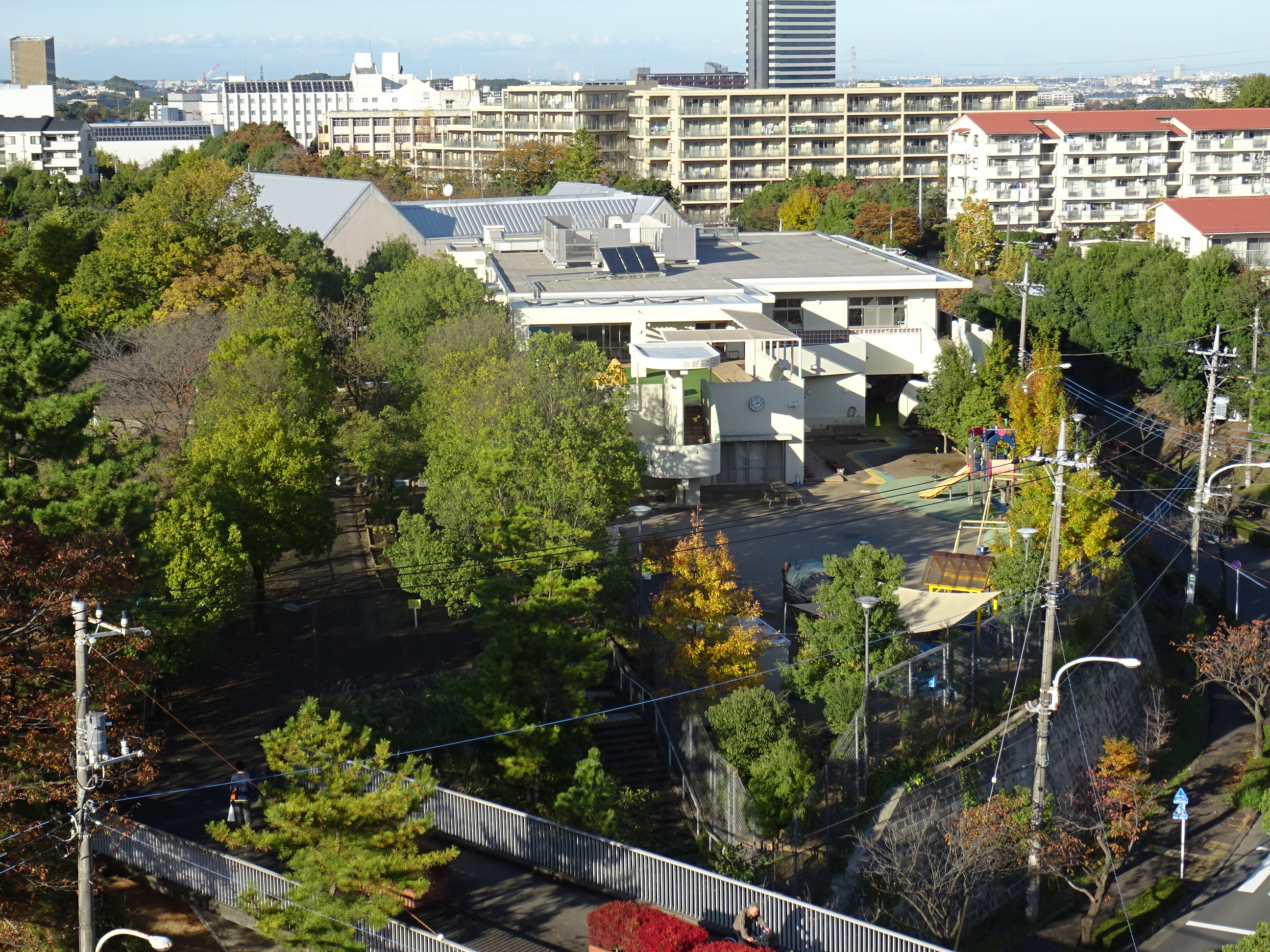 多摩市落合にある東京都下で初の幼保連携型認定こども園「おだ認定こども園」（2015/11/15撮影）